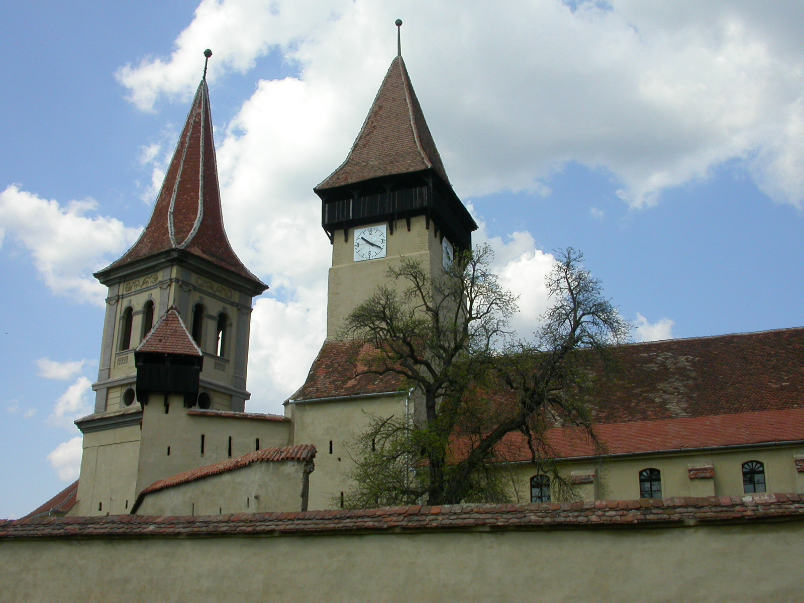 Ansamblul bisericii evanghelice fortificate, sec. XIV - XVII